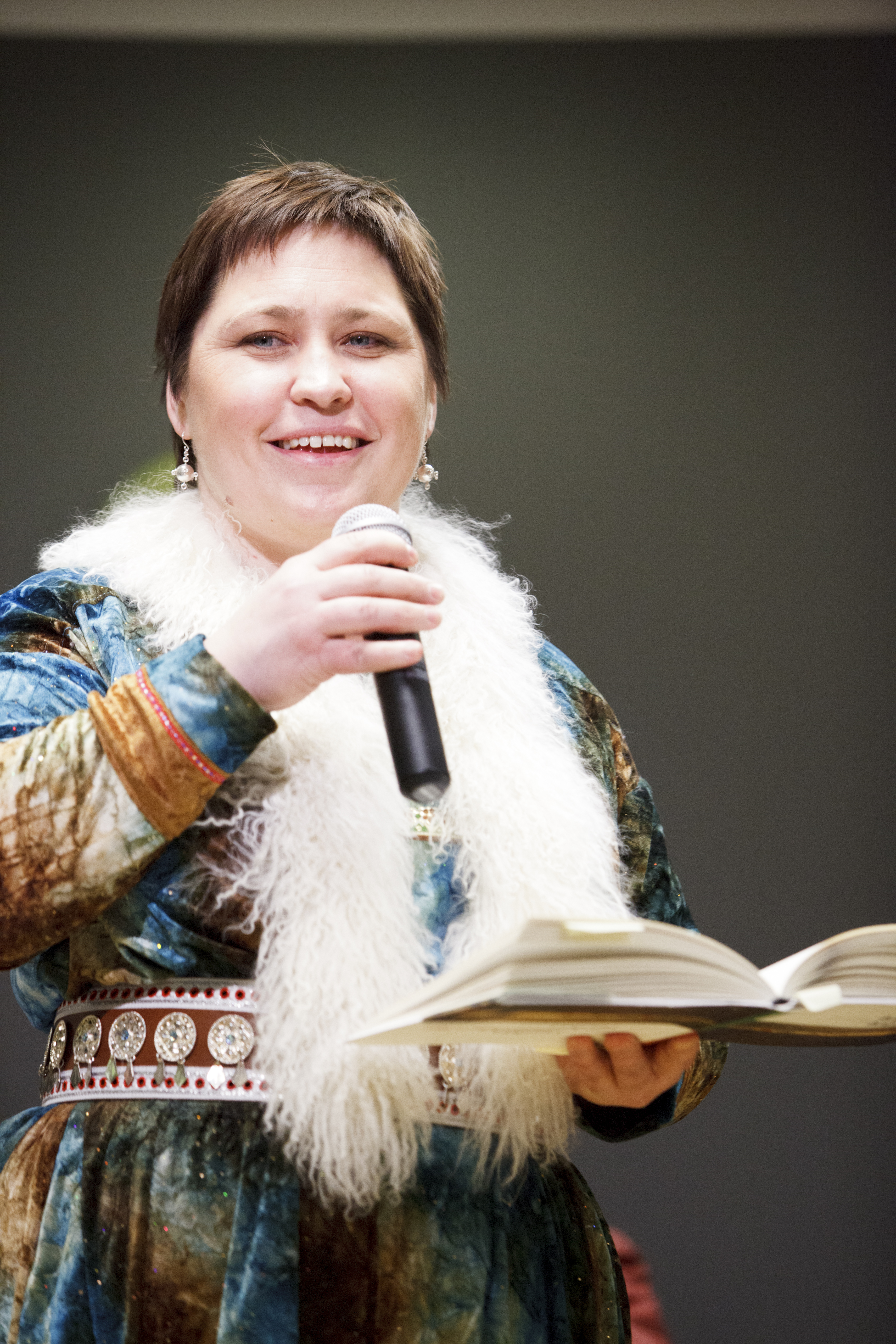 Rawdna Carita Eira fra det samiske sprogområde, nomineret til Nordisk Råds litteraturpris 2012 til seminar hos Kulturkontakt Nord i Finland.